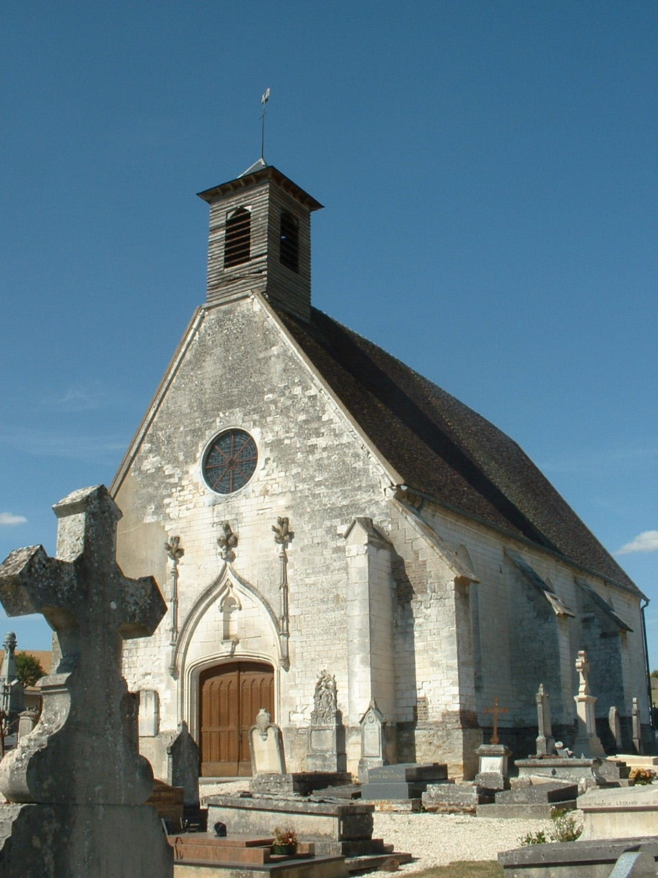 Chapelle St Avit F-10160 Aix-en-Othe